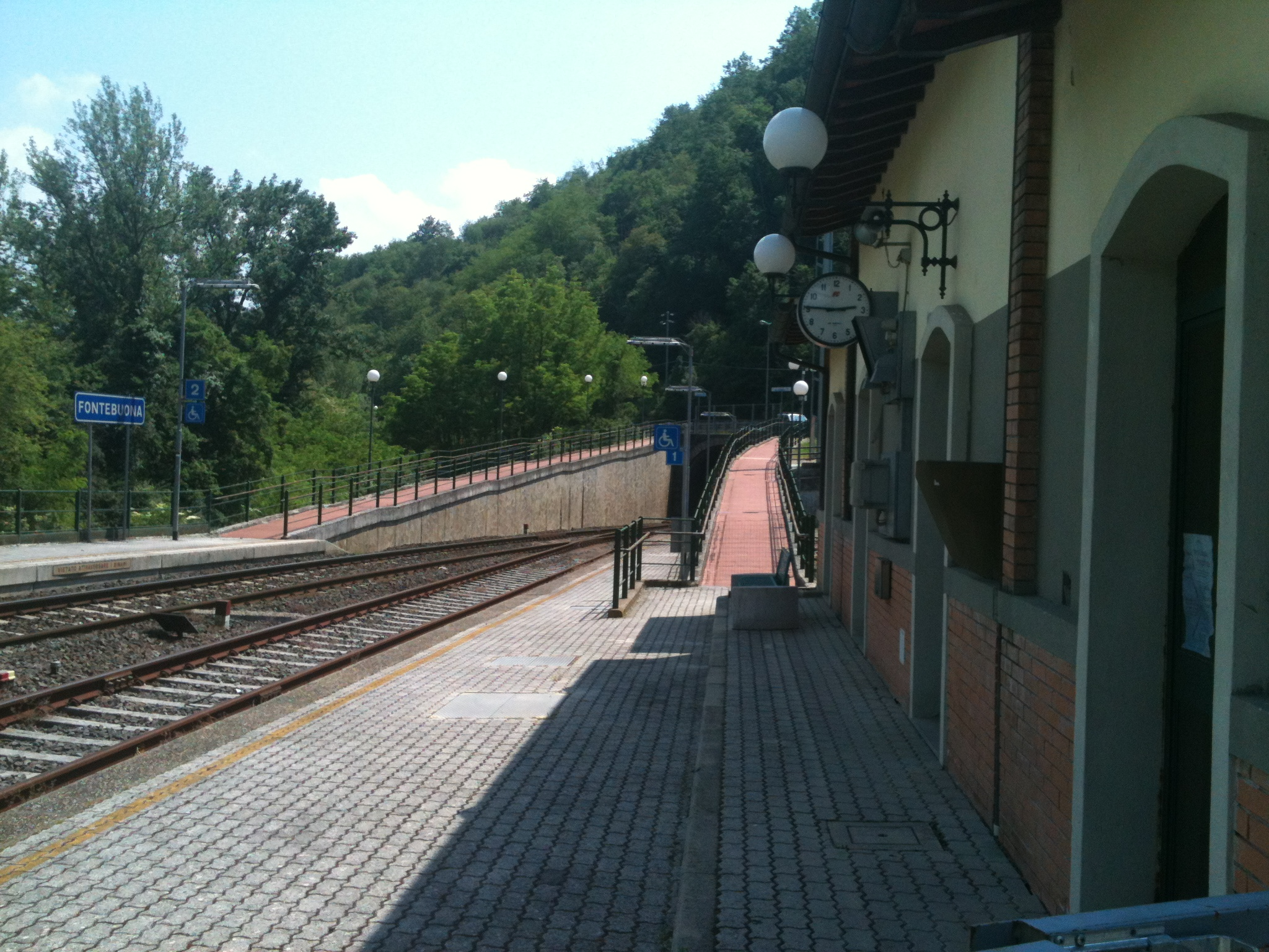 lato partenze stazione di fontebuona vaglia